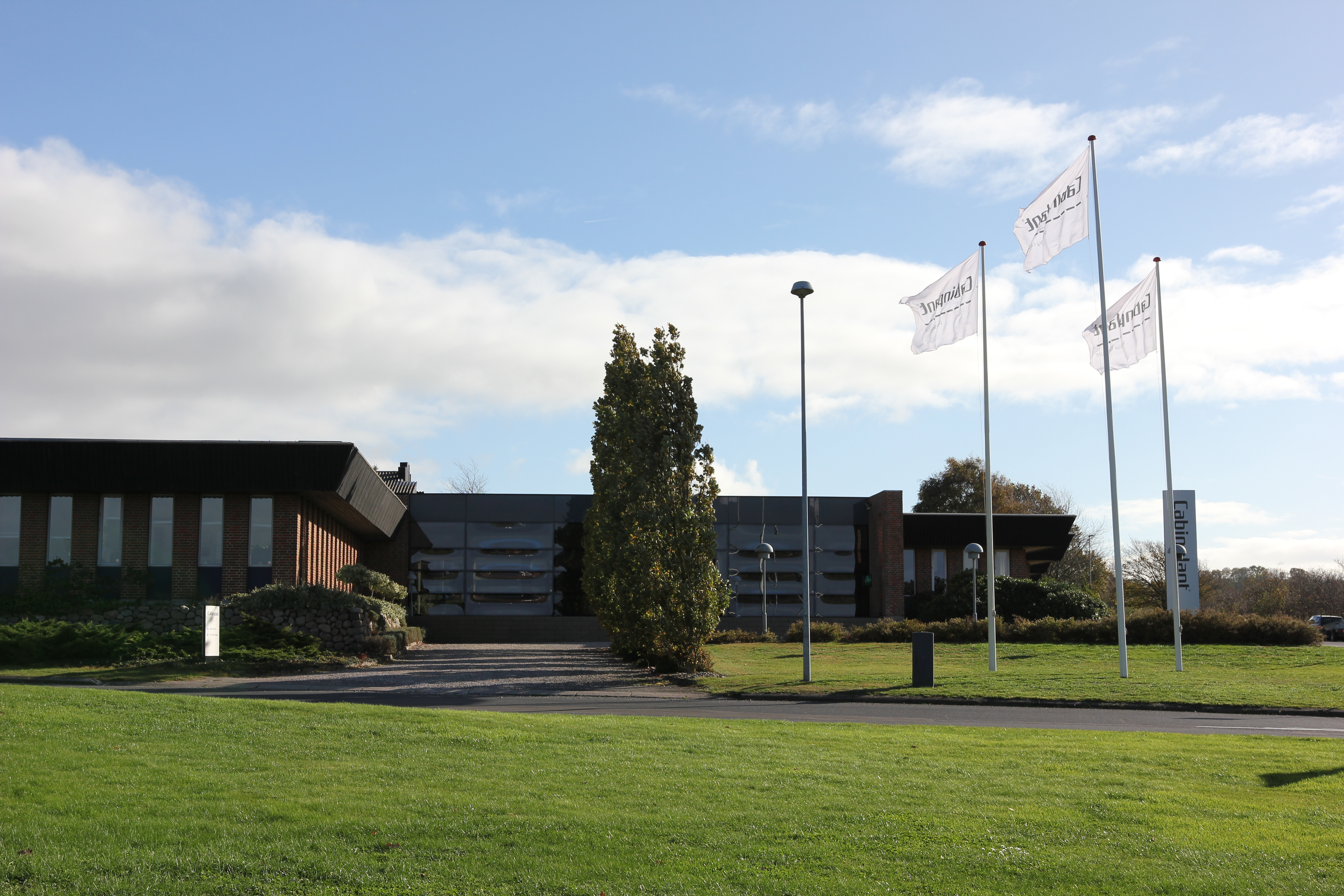 Cabinplant, Haarby, slut 2018